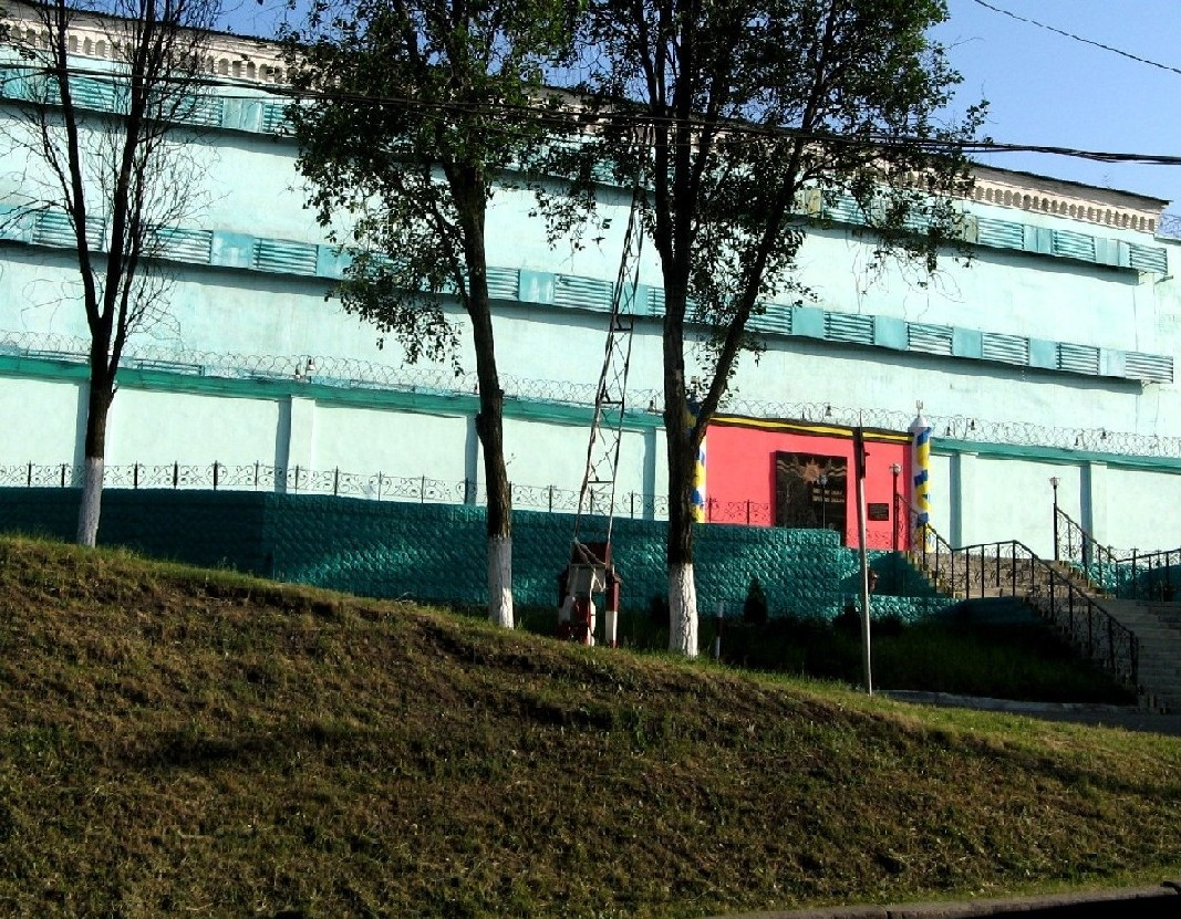 г.Харьков. Холодногорская тюрьма на ул. Полтавский шлях.